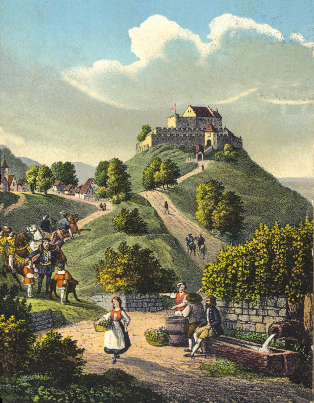 Stuttgart-Rotenberg. Burg Wirtemberg um 1600 auf Ansichtskarte von 1920 (Darstellung gegenüber Realsituation, spiegelverkehrt)